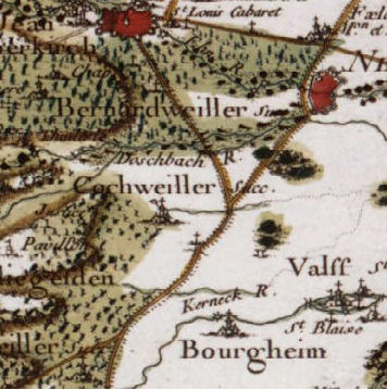 Goxwiller auf einer Karte des 18. Jahrhunderts